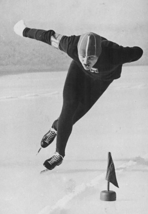 Manfred Schüler Zentralbild ATP 3.2.1960 DDR-Olympiateilnehmer für die gemeinsame deutsche Mannschaft zu den 8.Olympischen Winterspielen in Squaw Valley vom 18. bis 28.2.1960 UBz: Eisschnelläufer Manfred Schüler. Abgebildete Personen: Schüler, Manfred: Eisschnelläufer, Olympiateilnehmer 1960, DDR